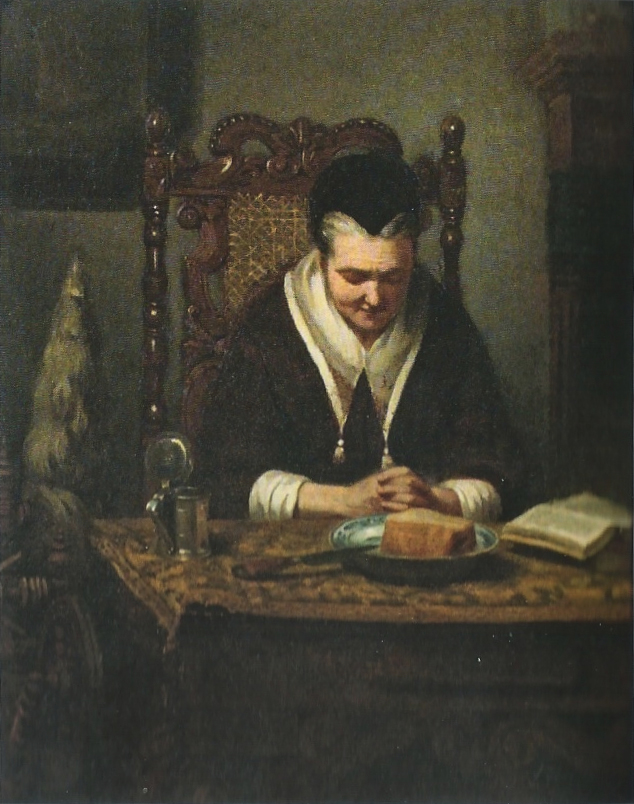 "In gebed" of "Het gebed"